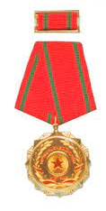 Vietnam Bravery Order